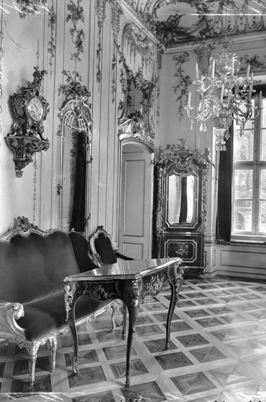 Potsdam.- Zimmer im Stadtschloß